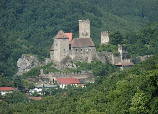 Burg Hardegg in Hardegg an der Thaya